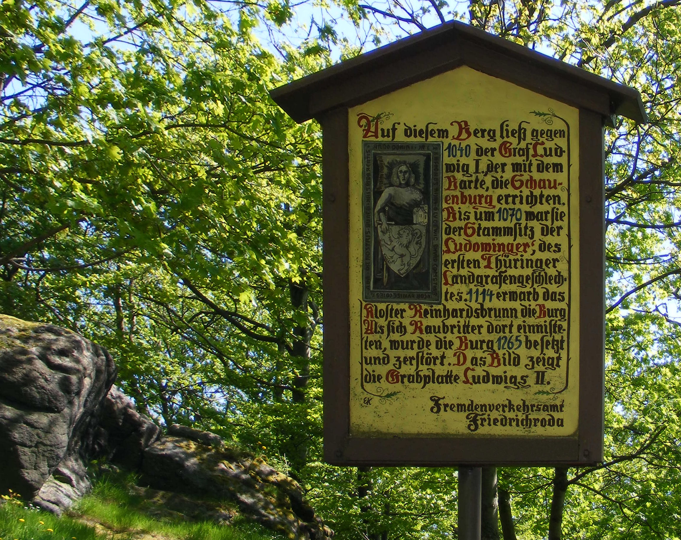 Informationstafel auf der Schauenburg bei Friedrichroda in Thüringen